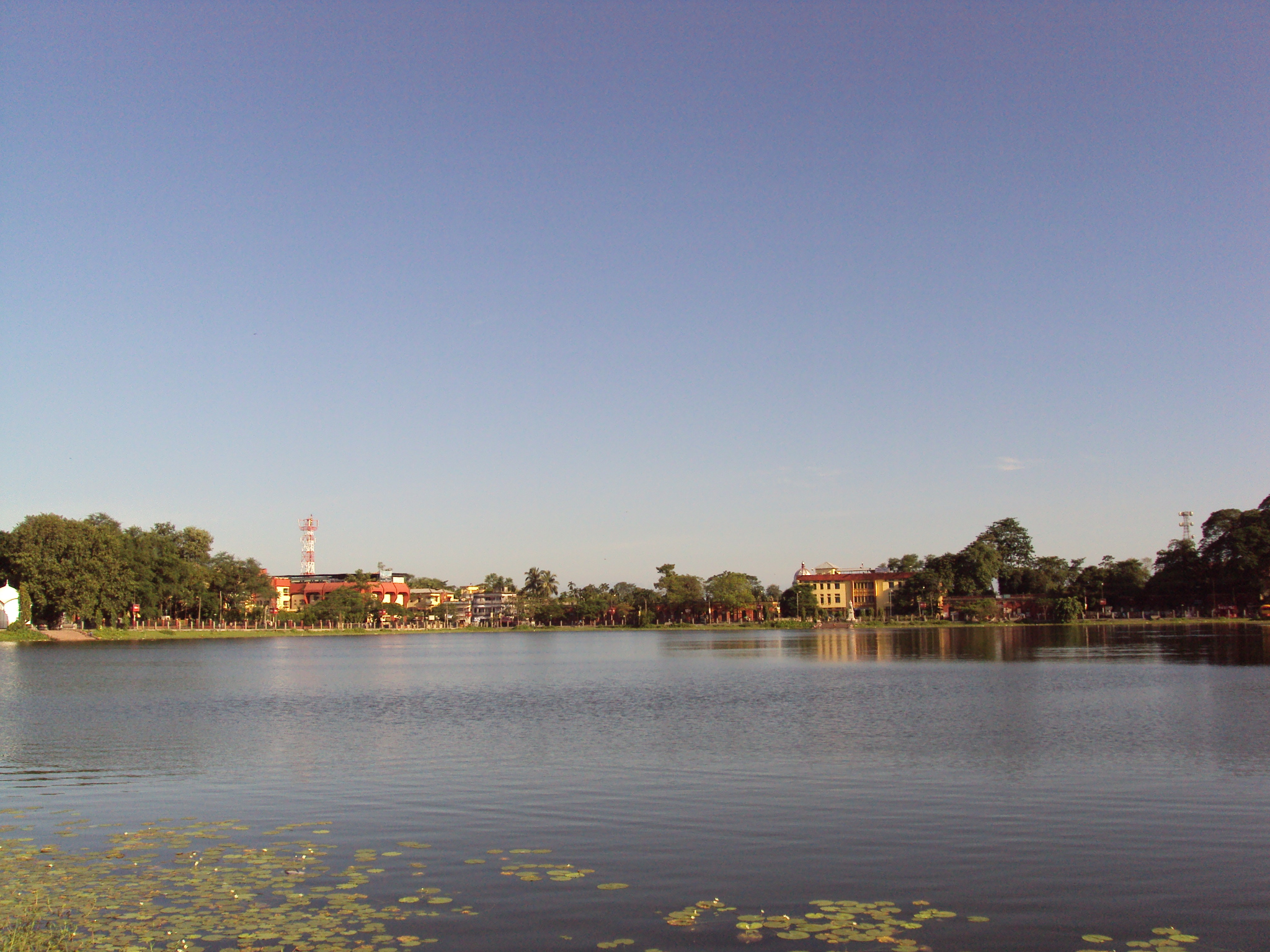 Sagardighi @ Cooch Behar